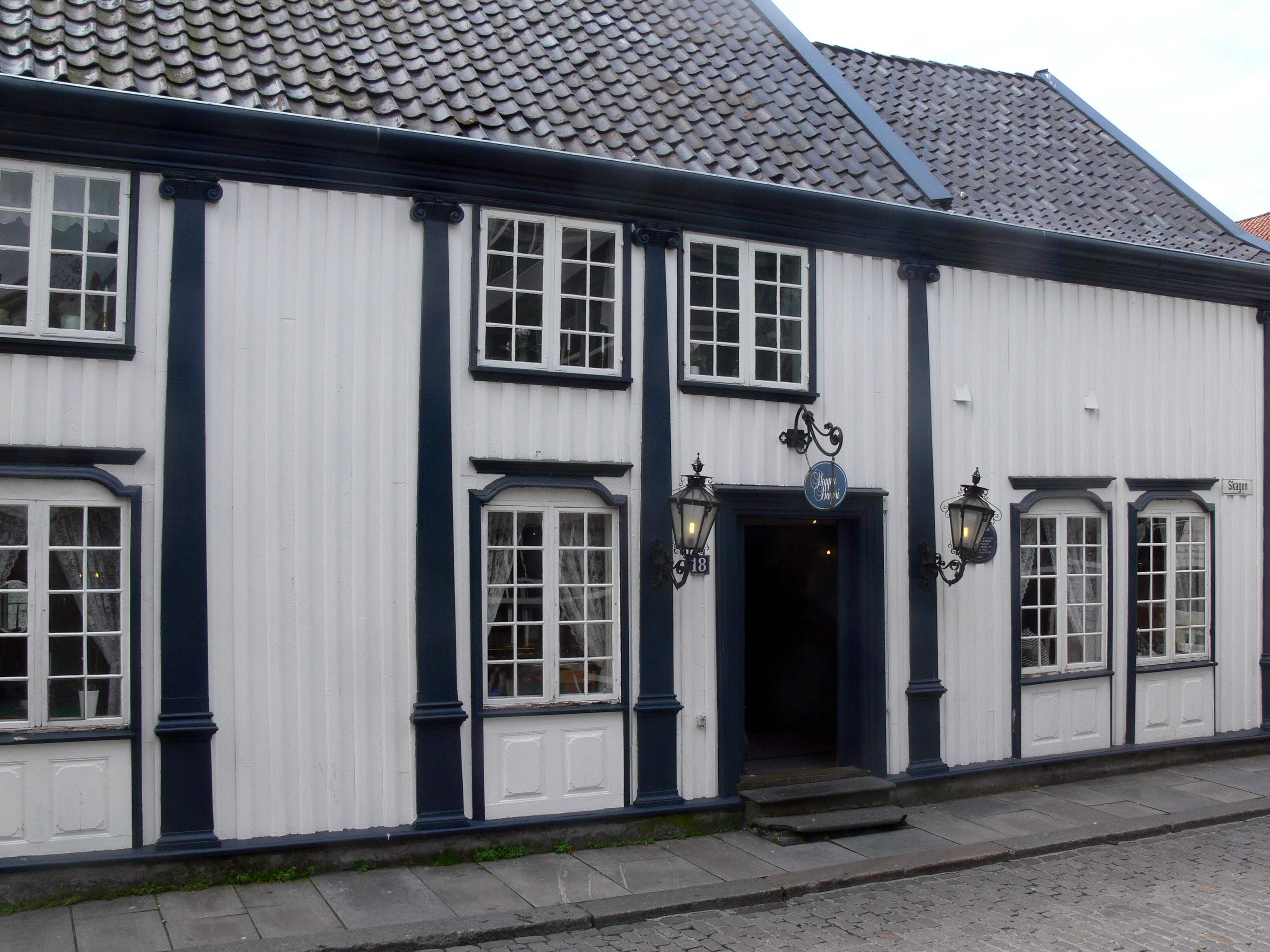 Das Café "Skagens Bageri" in Stavanger